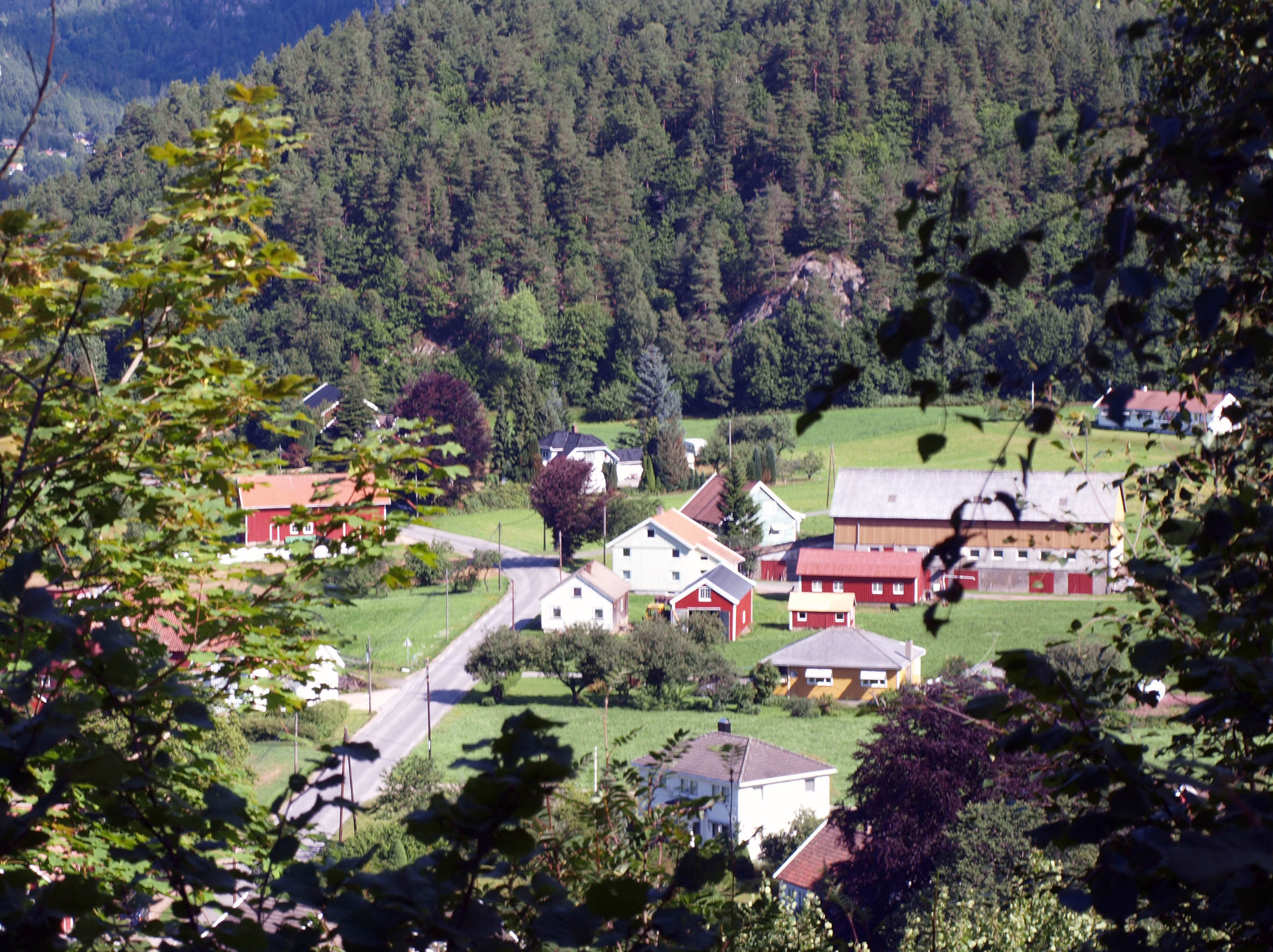 Skofteland i Lindesnes kommune